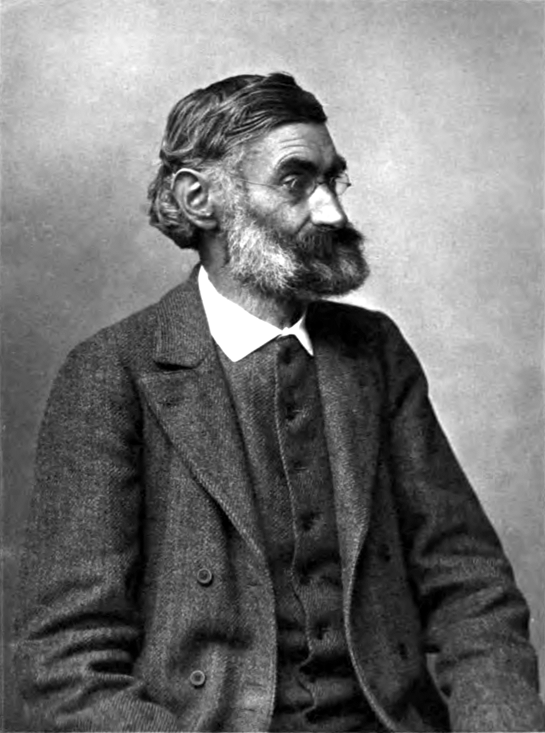 Ernst Abbe (1840-1905), German astronomer